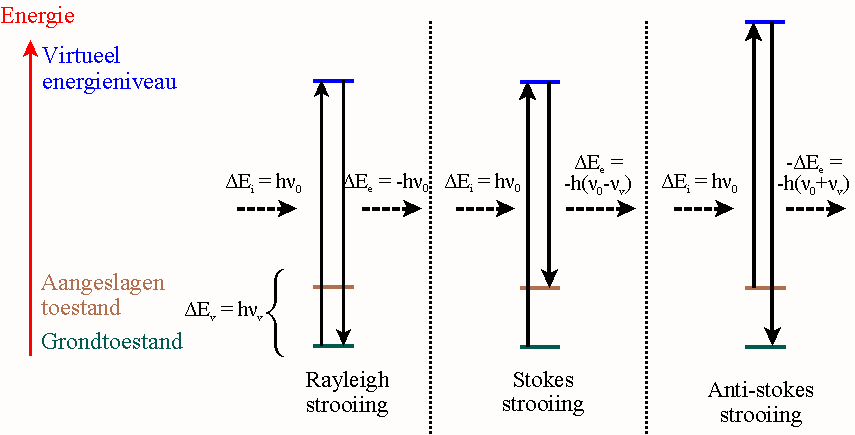 In deze figuur worden de verschillende mogelijkheden voor Raman strooiing voorgesteld. Wanneer licht invalt op een product, wordt het geëxciteerd naar een zogenaamd virtueel energieniveau. Afhakelijk van het feit of er door het licht geen energieuitwisseling optreedt, energie opgenomen wordt of energie afgegeven wordt, spreekt men respectievelijk van Rayleigh straling, stokes-strooiing of anti-stokes-strooiing. Categorie:Spectroscopie Image:Ramanscattering.png